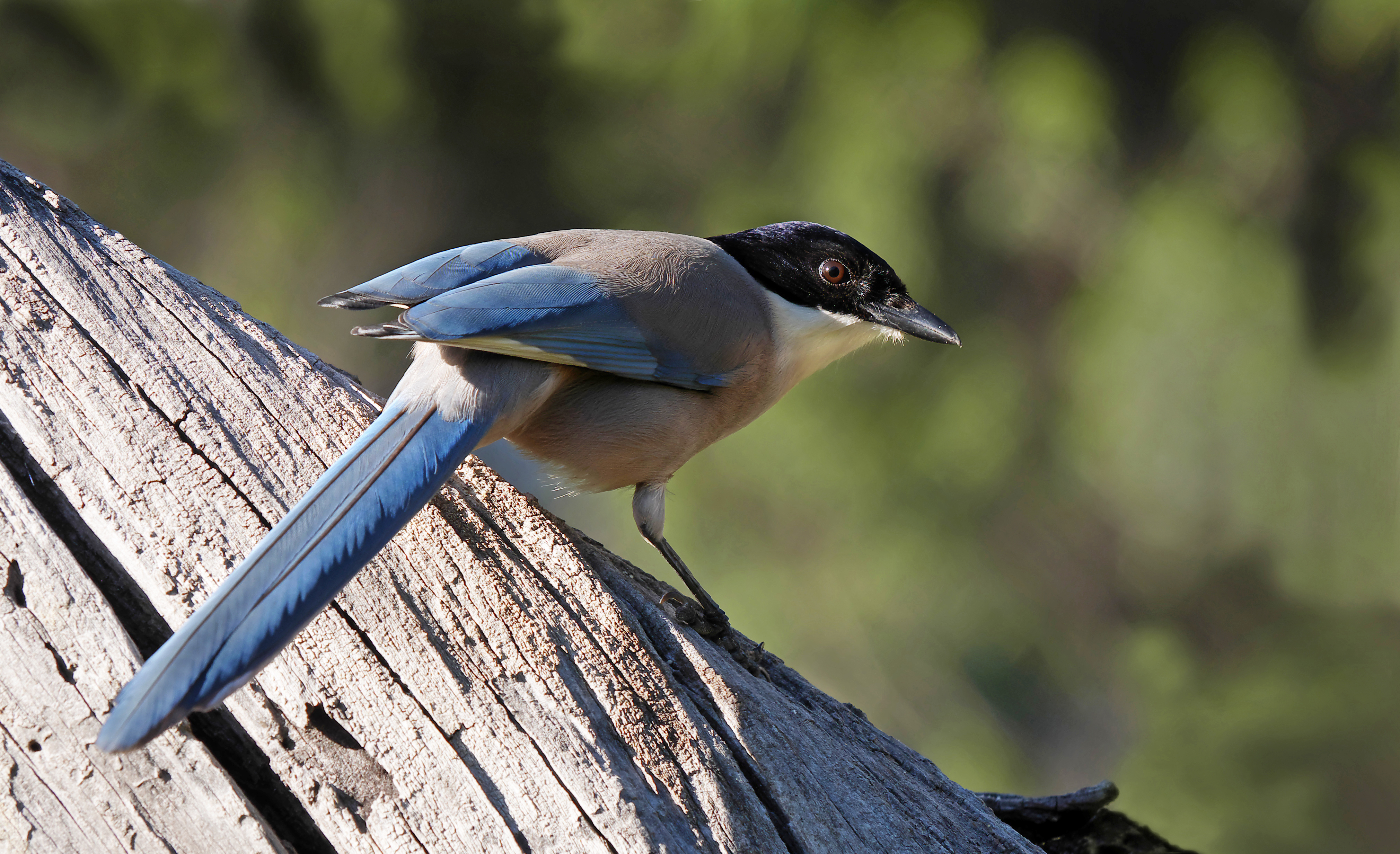 Iberian magpie (Cyanopica cooki), Parque natural de la Sierra de Andújar, España